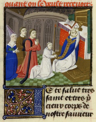 Français 458, fol. 39v, Jacques d'Armagnac en prière à la messe